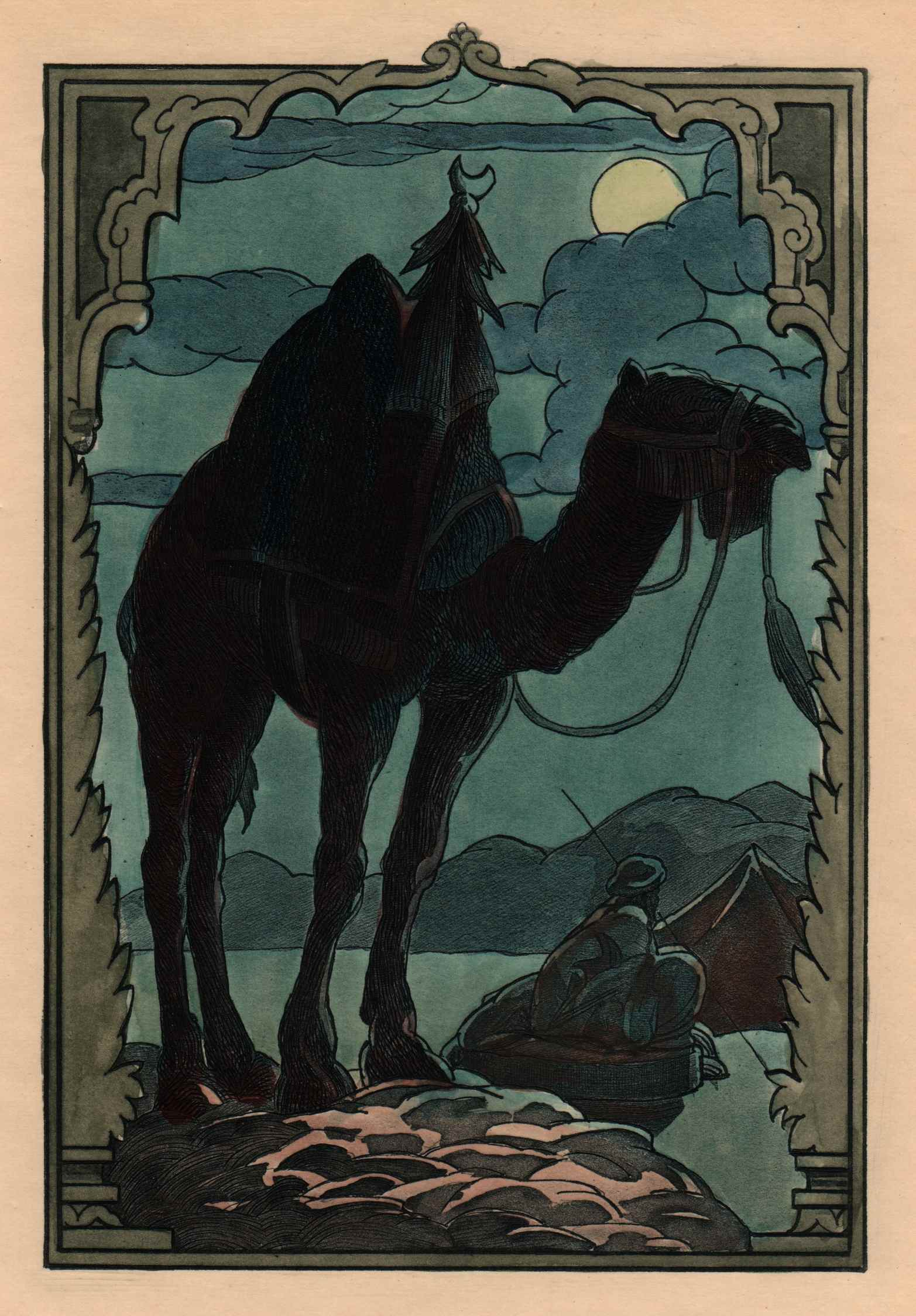 Septième hors-texte (édition rehaussée à la peinture) du livre Nouvelles asiatiques de Joseph Arthur de Gobineau, Paris, éditions Crès 1924 Illustration placée en tête de la nouvelle : La Vie de voyage